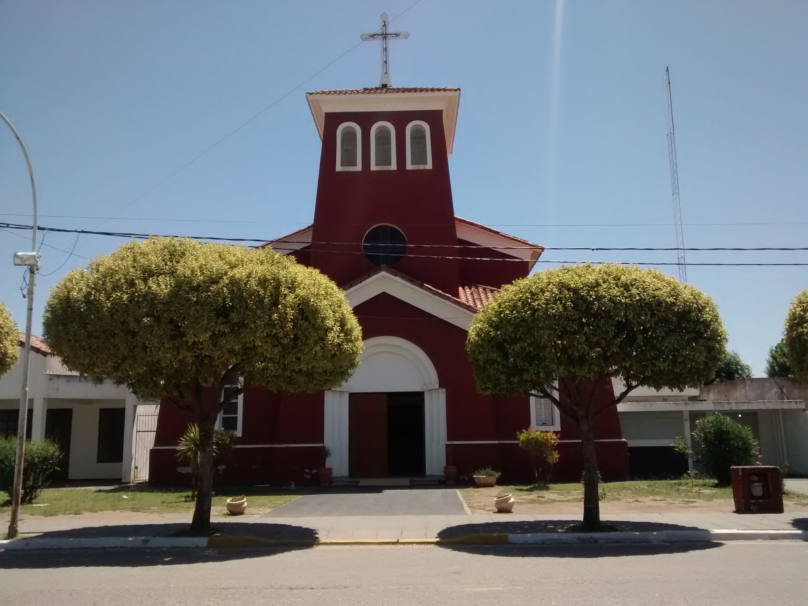 Parroquia Nuestra Señora de Los Remedios, en la Ciudad de Monte Cristo, Córdoba, Argentina. Se ubica frente a la Plaza Domingo Faustino Sarmiento. Sobre calle Luis Tagle.